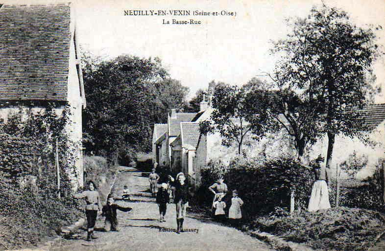 Neuilly-en-Vexin (France) - La Basse-Rue vers 1900